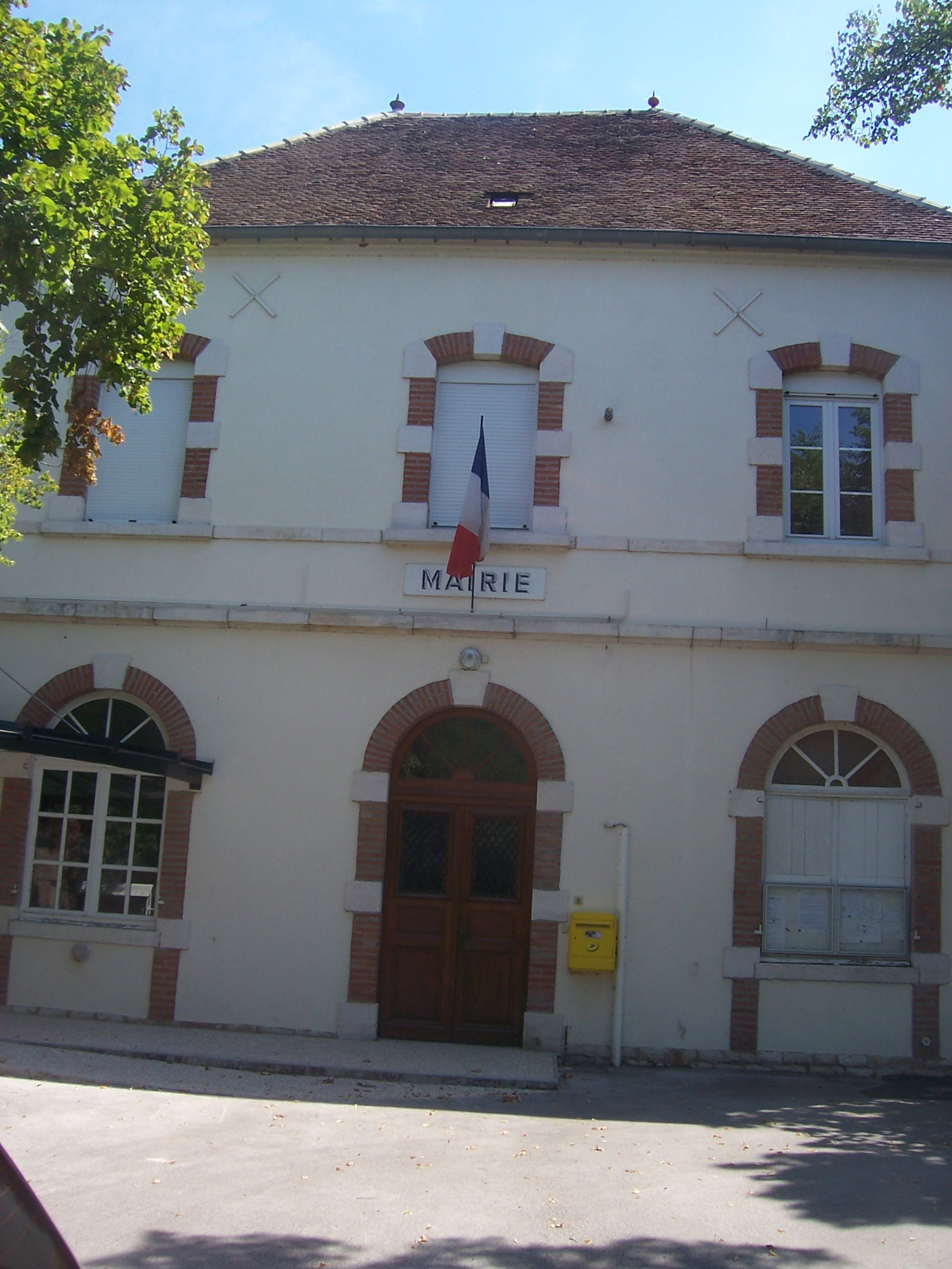 Mairie de Saint-Didier-en-Bresse